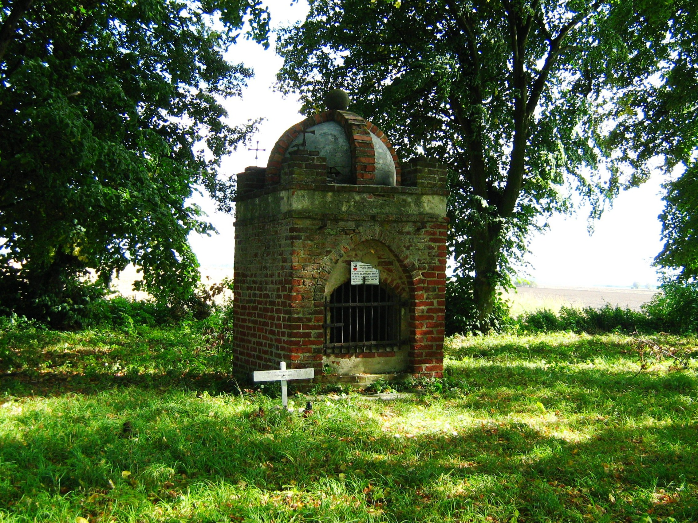 Bystrze - gotycka kaplica cmentarna z pierwszej połowy XIV w. zbudowana w celu złożenia kości poległych w wojnie trzynastoletniej. Kaplica murowana z czerwonej cegły na zaprawie wapiennej, zwieńczona półkolistą kopułą z czterema ceglanymi żebrami oraz kulą.